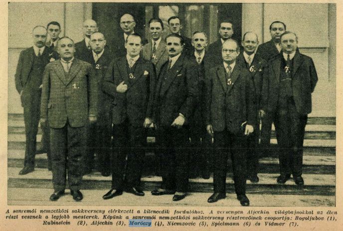 Az 1930-as San Remo-i nemzetközi sakkverseny résztvevői: 1 - Bogoljubov, 2 - Rubinstein, 3 - Aljechin, 4 - Maróczy, 5 - Nimzowitsch, 6 - Spielmann, 7 - Vidmar